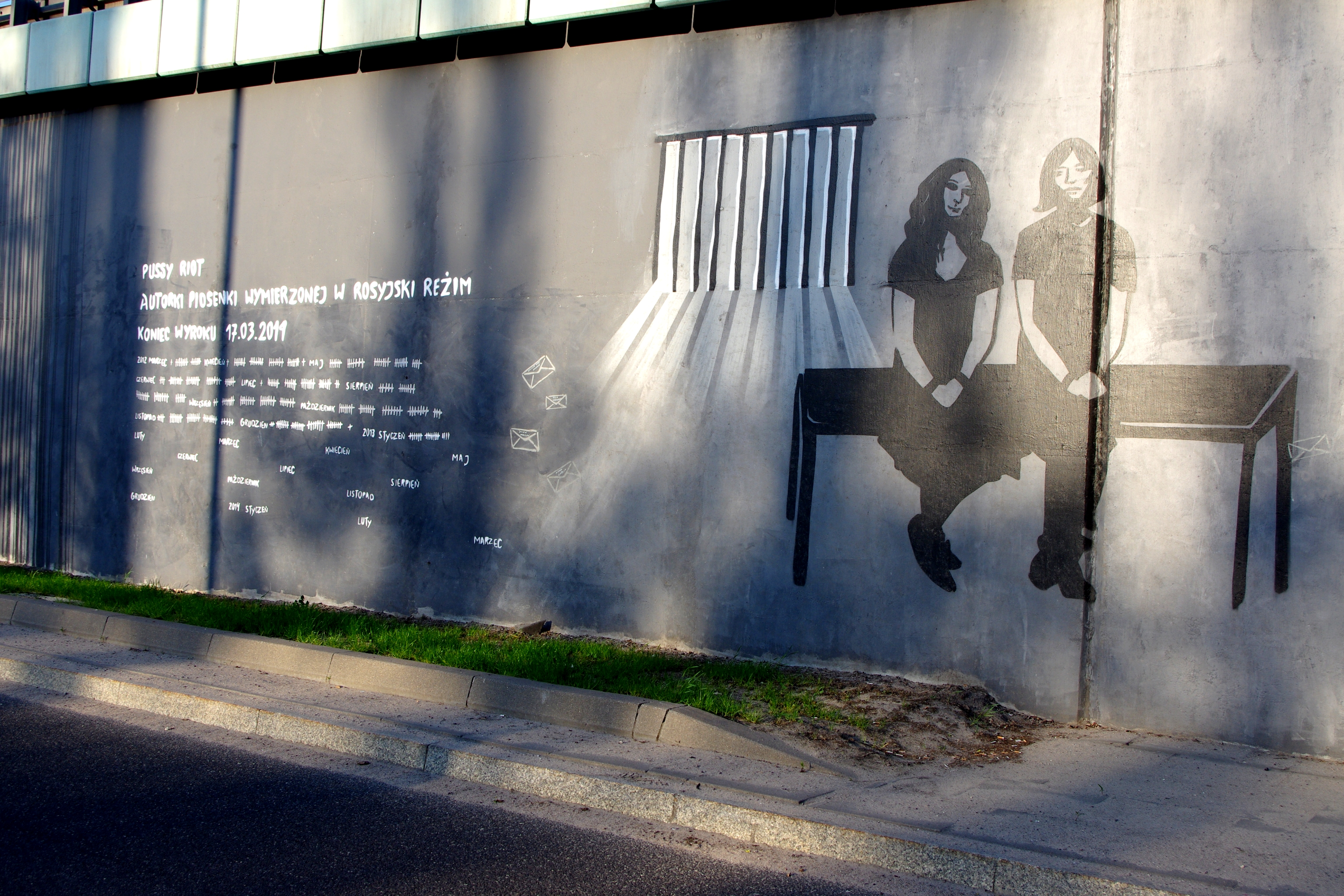 Mural "Kalendarze empati" na ścianie przy skrzyżowaniu ulicy Górczewskiej i Alei Prymasa Tysiąclecia w Warszawie, prezentujący osoby uznane przez Amnesty International za tzw. więźniów sumienia